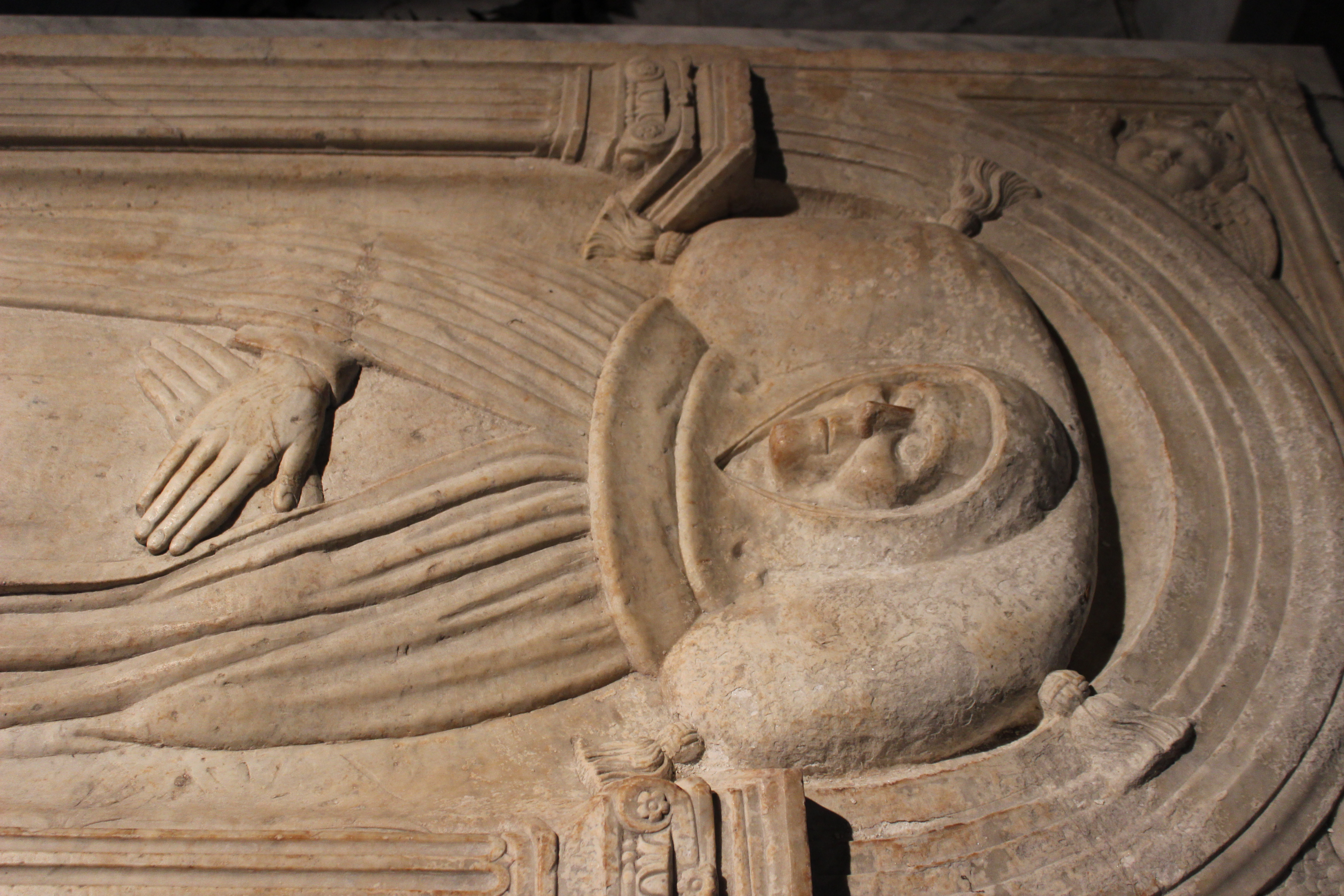 Roma. Santa Maria sopra Minerva. Tumba de fra Angelico.